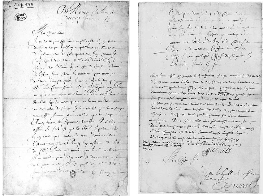 Письмо Блеза Паскаля своей сестре Жильберте